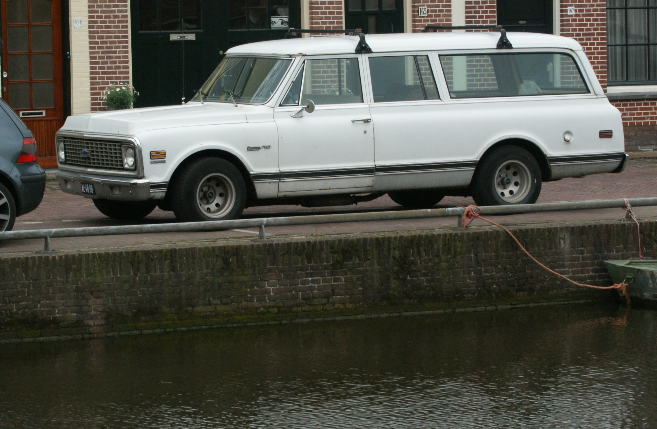 AL-48-00